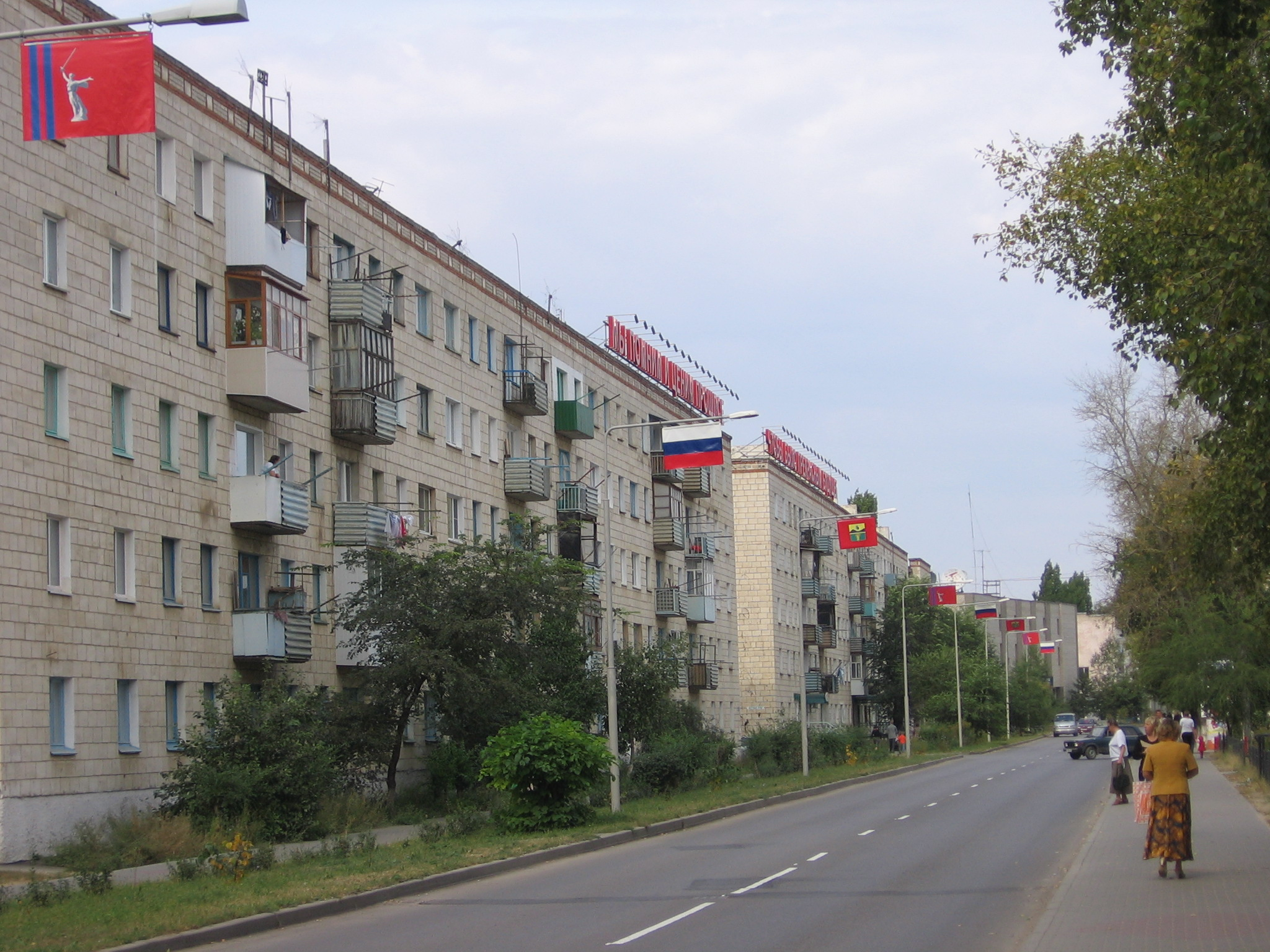 ул. Ломоносова